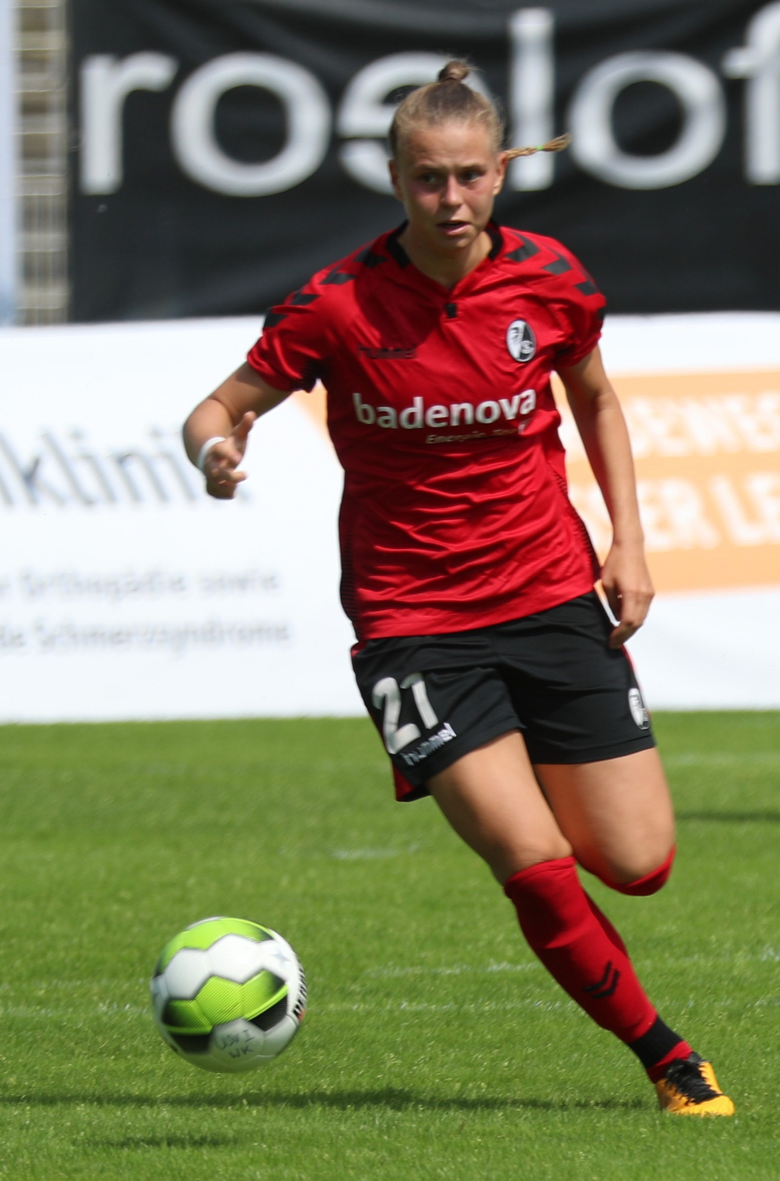 Allianz-Frauen-Bundesliga: FF USV Jena gegen SC Freiburg